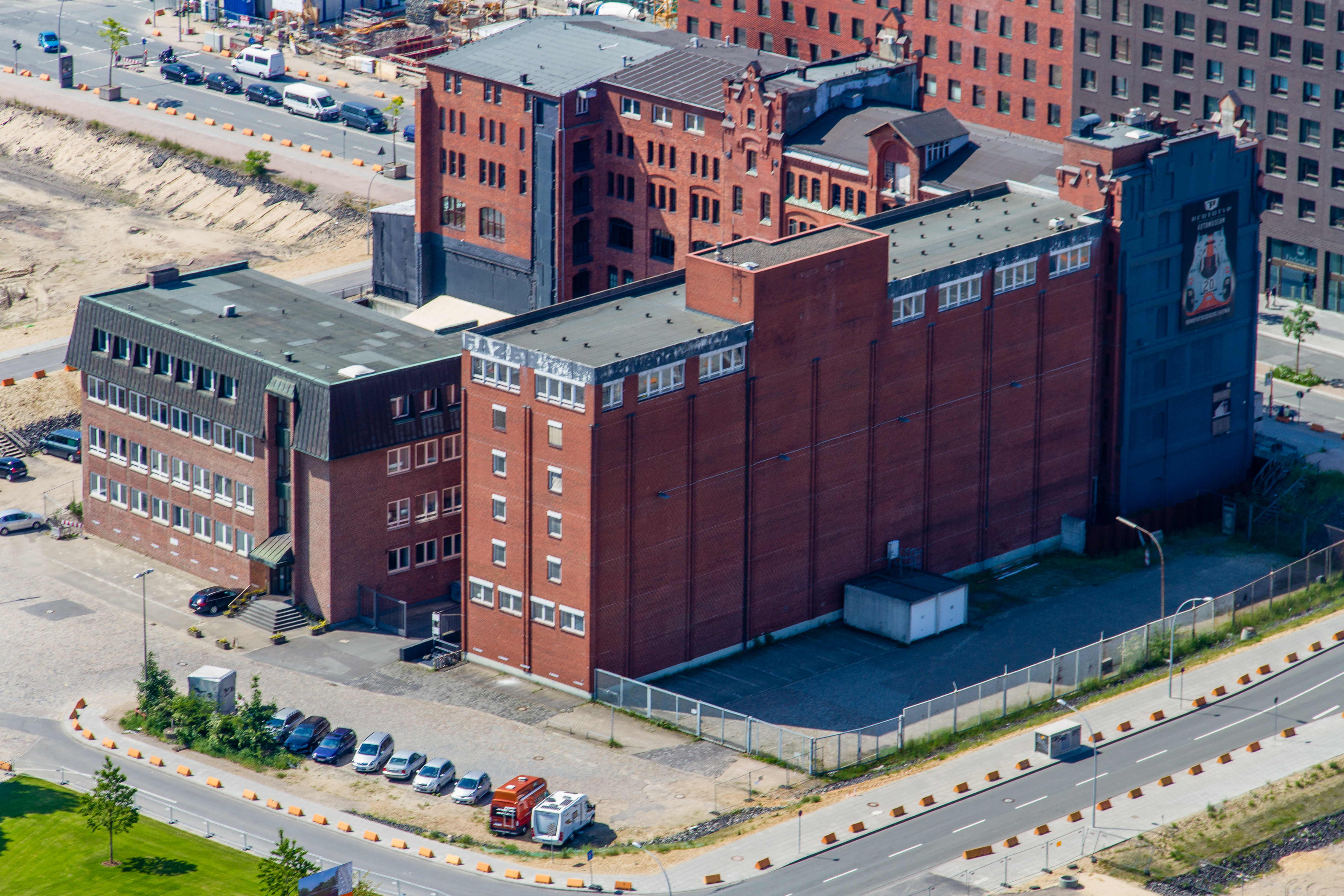 Aufnahme während des Projekts Heißluftballon